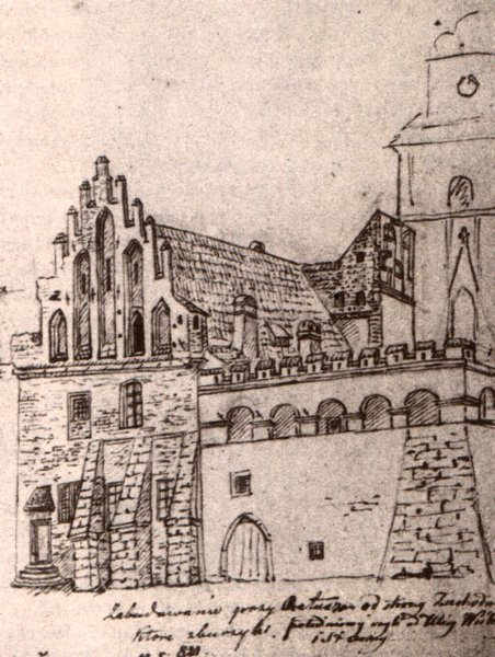 Ratusz krakowski J. Brodowski - rysunek XIX wiek